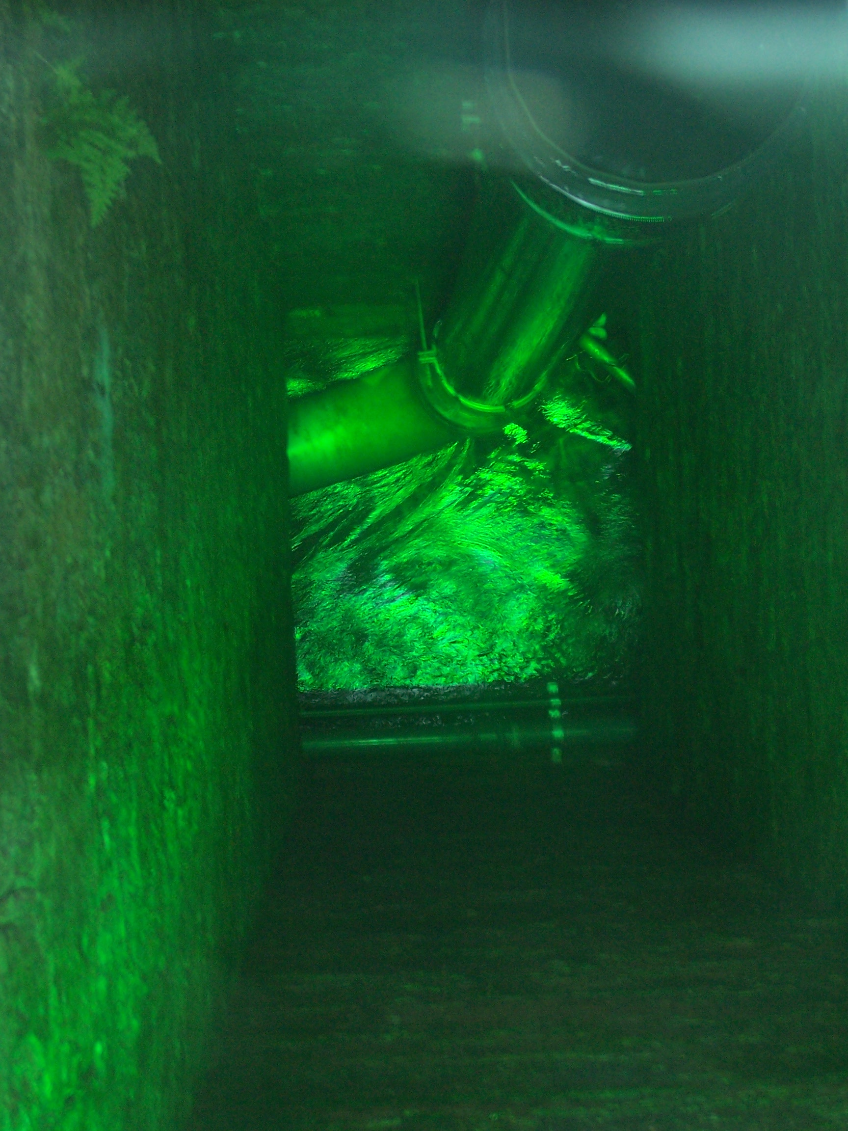 Luftschacht des Grabenbachs Bei Verwendung bitte ich hier um einen Hinweis, wo das Foto genutzt wird.